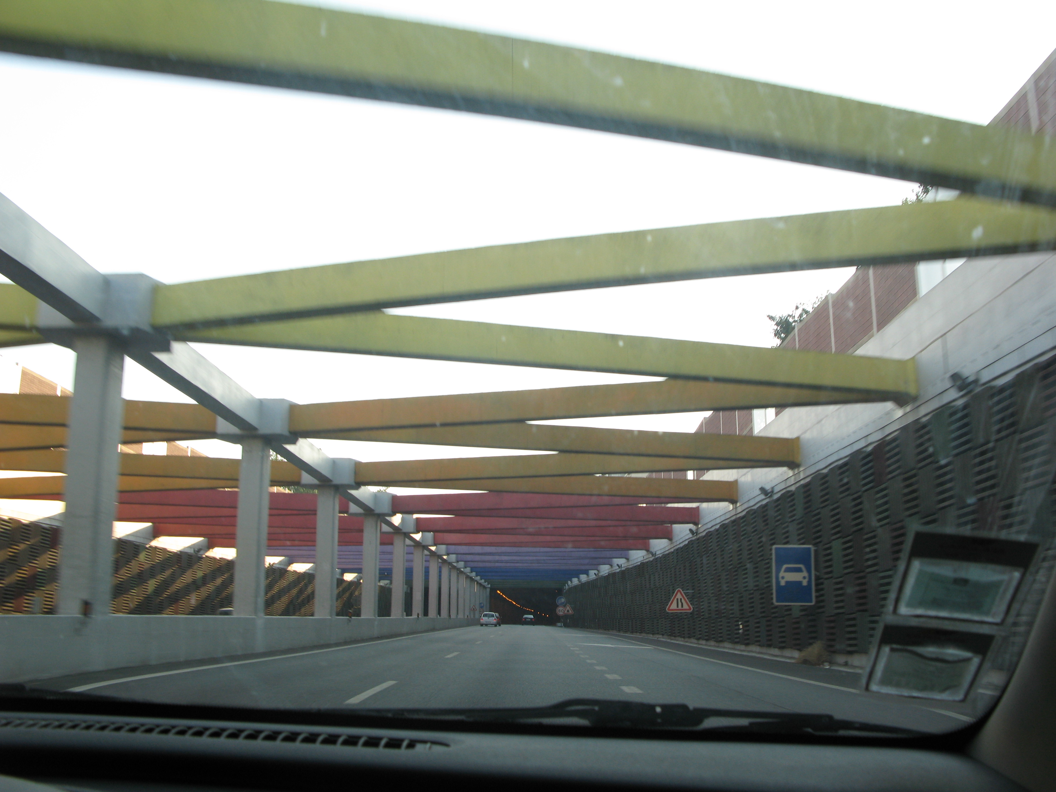 A Via de Cintura Interna entre os túneis de Soares dos Reis e o a Avenida da República, em Mafamude, Vila Nova de Gaia.